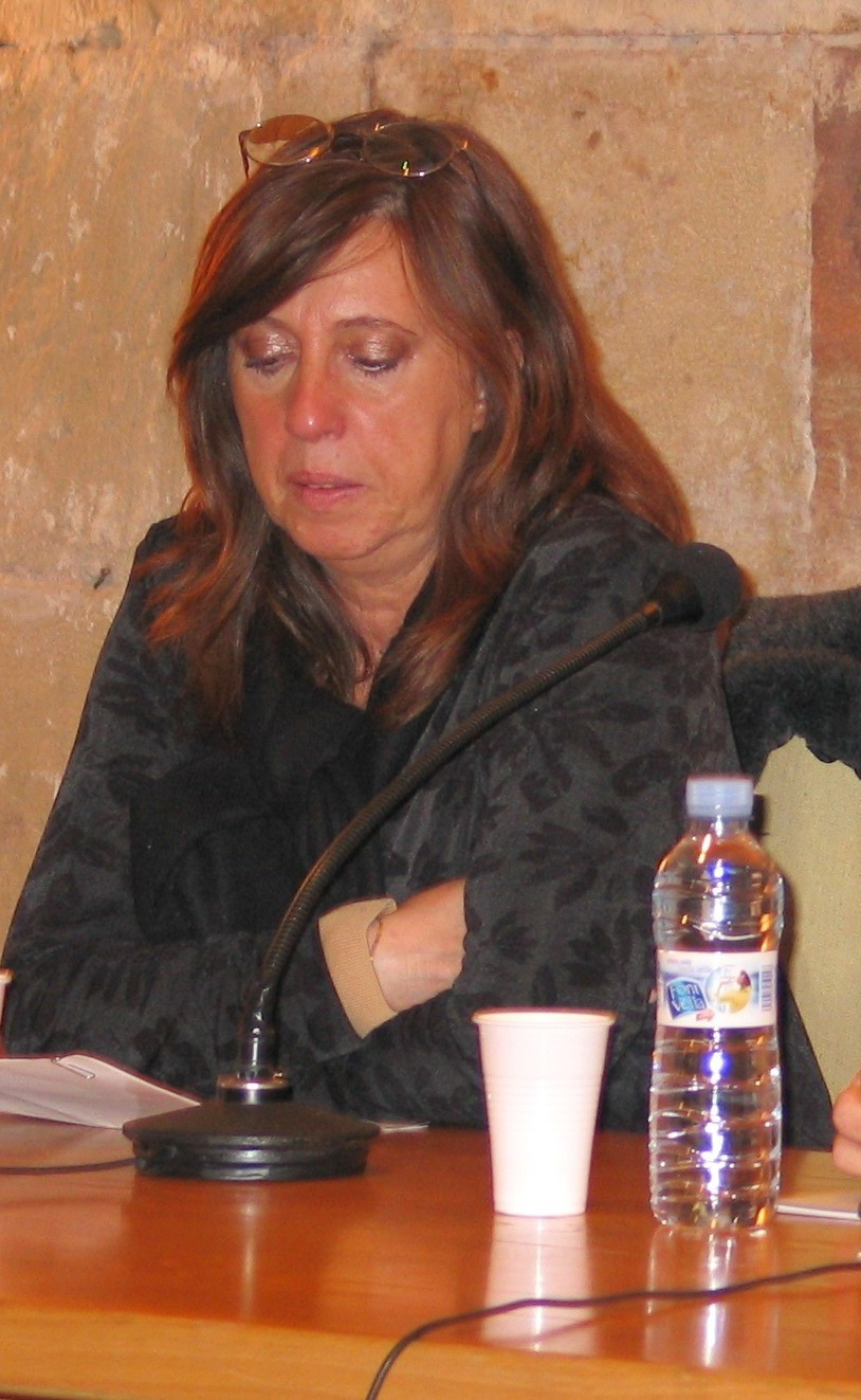 La Doctora Zabala en el Congreso Internacional La mujer vasca en el exilio de 1936". San Sebastián, 2007.